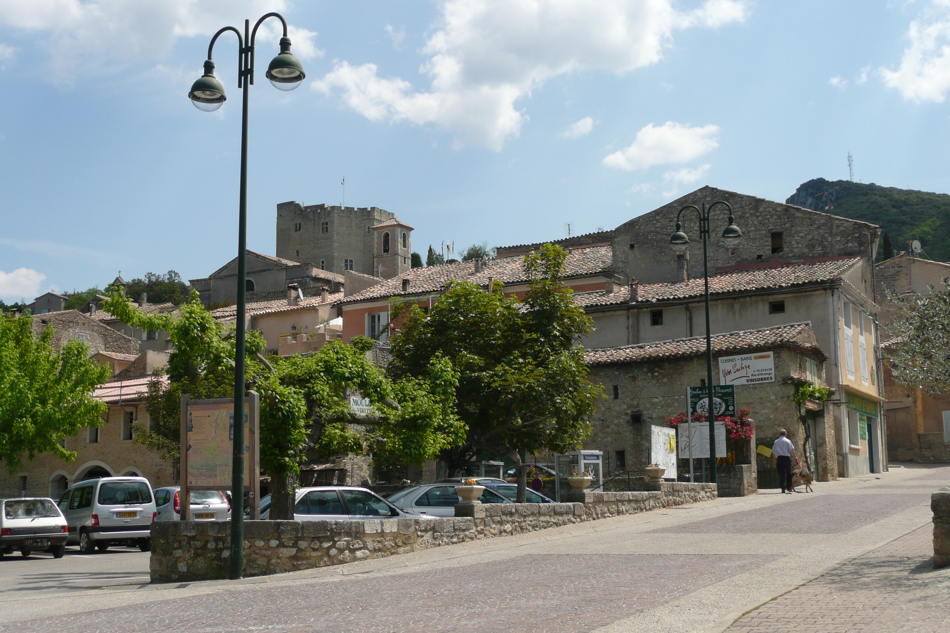 Mollans-sur-Ouvèze.